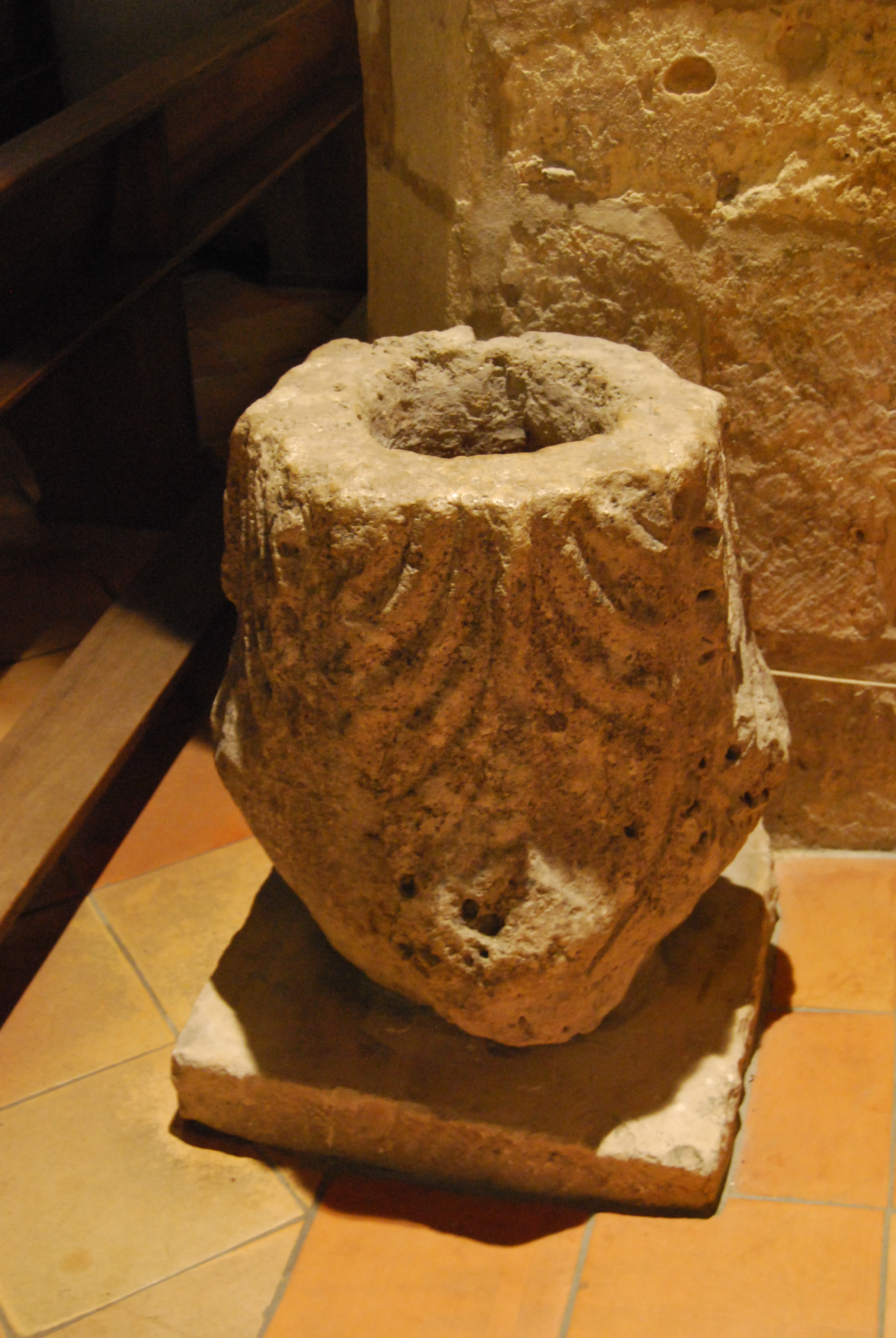 Eglise St Seurnin d'Artigues-près-Bordeaux